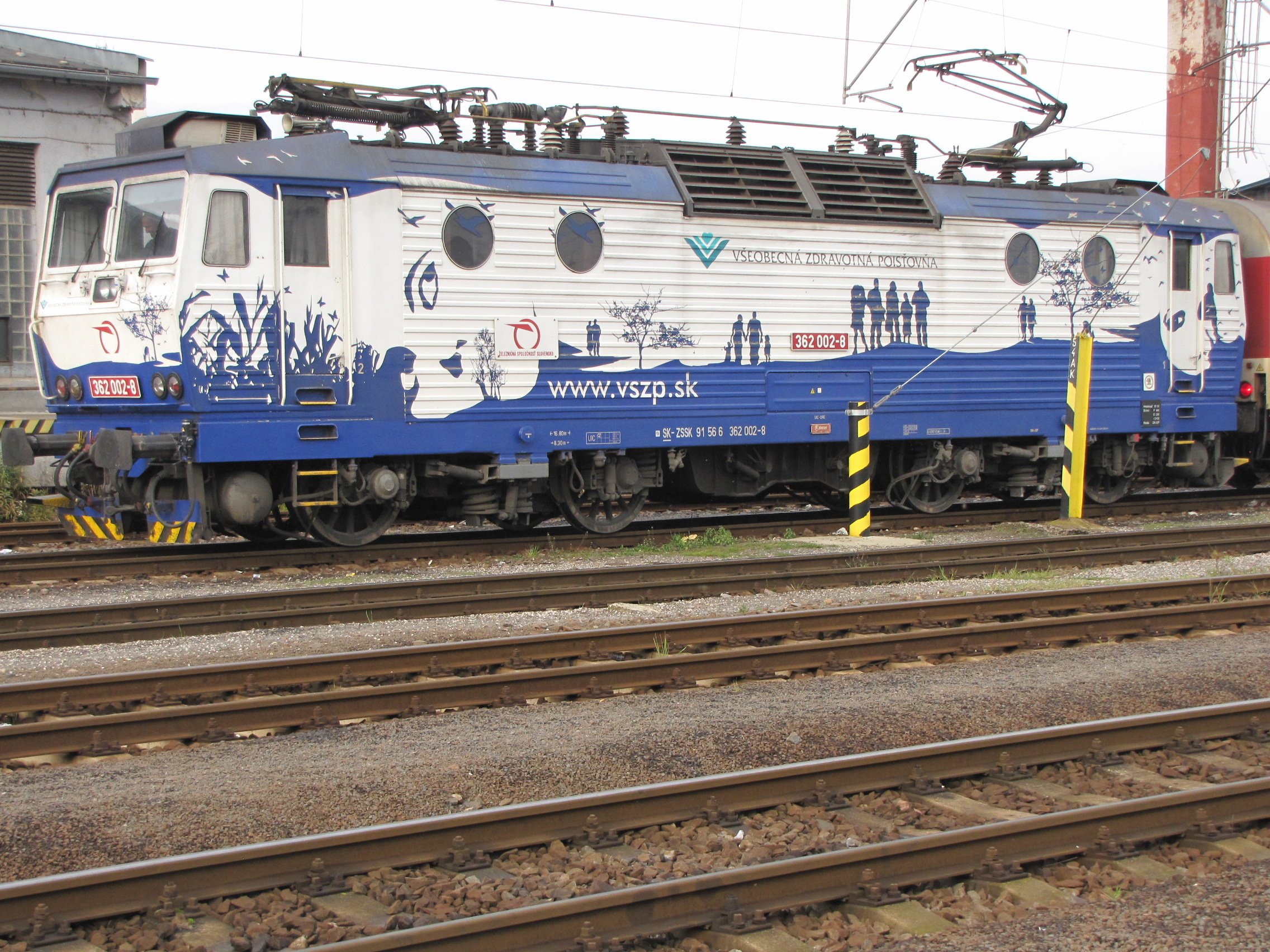 Általános Egészségbiztosító Társaság mozdony